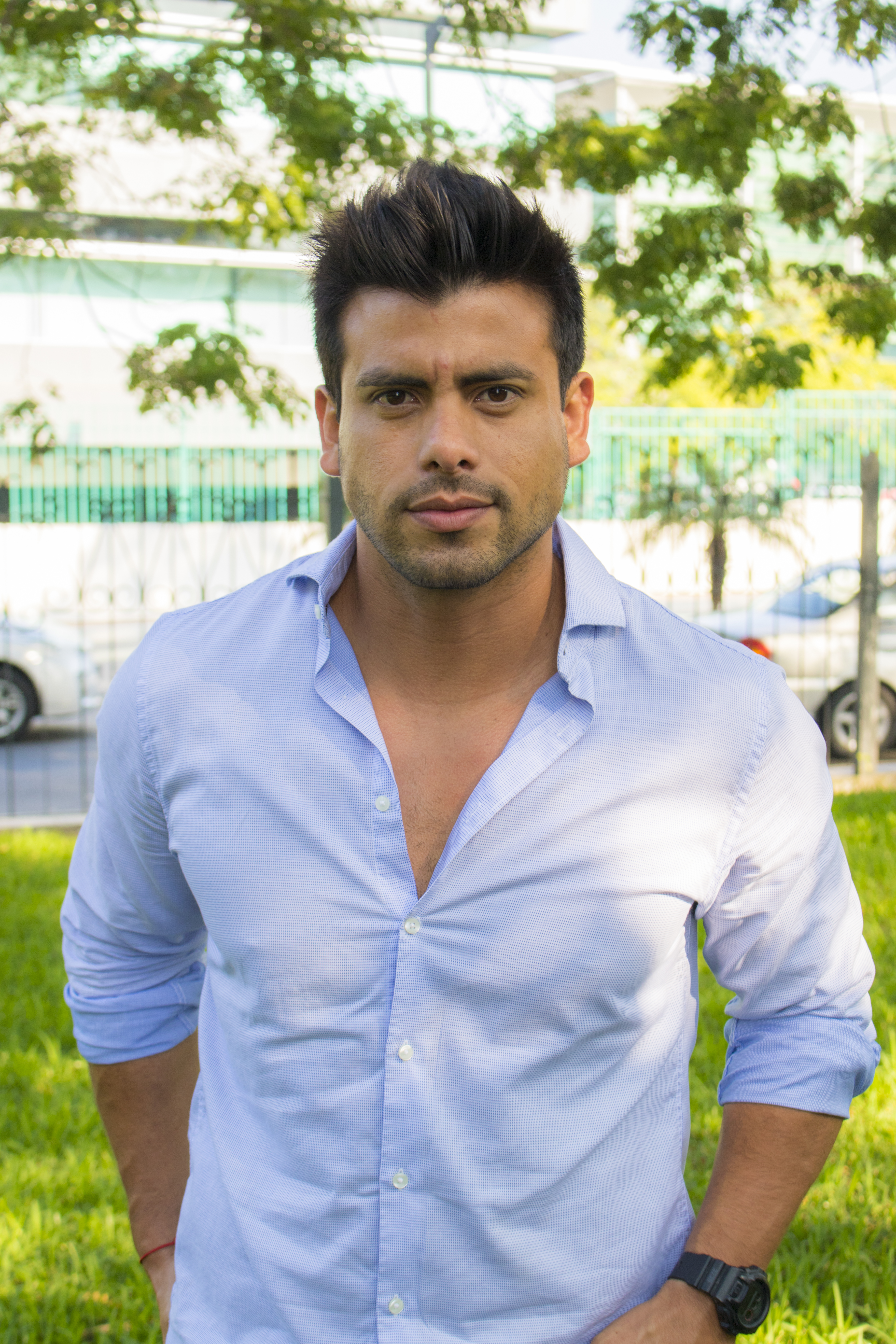 Efraín Ruales en 2018.